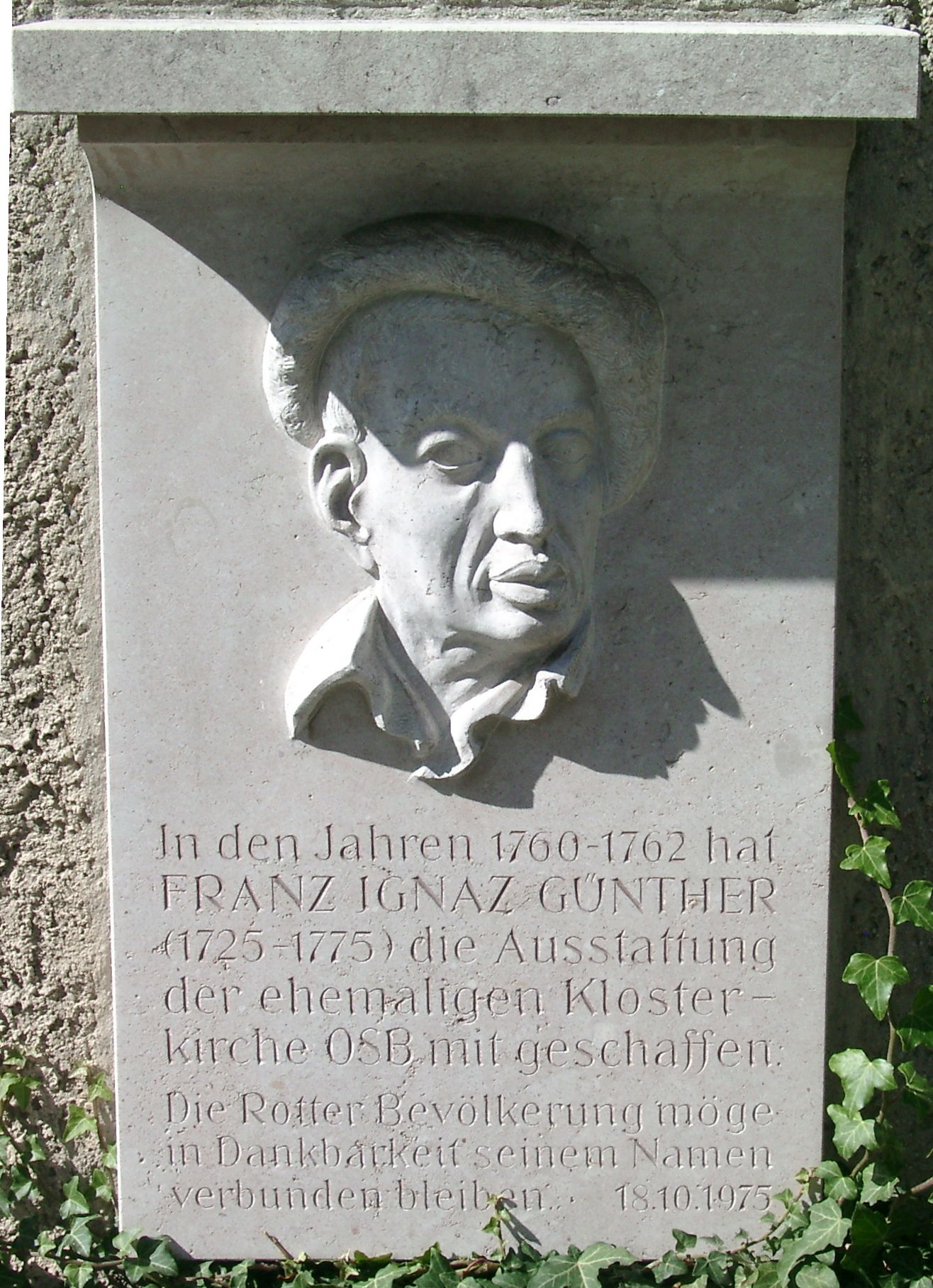 Gedenkstein für den Bildhauer Ignaz Günther bei der Klosterkirche St. Marinus und Anianus in Rott a. Inn